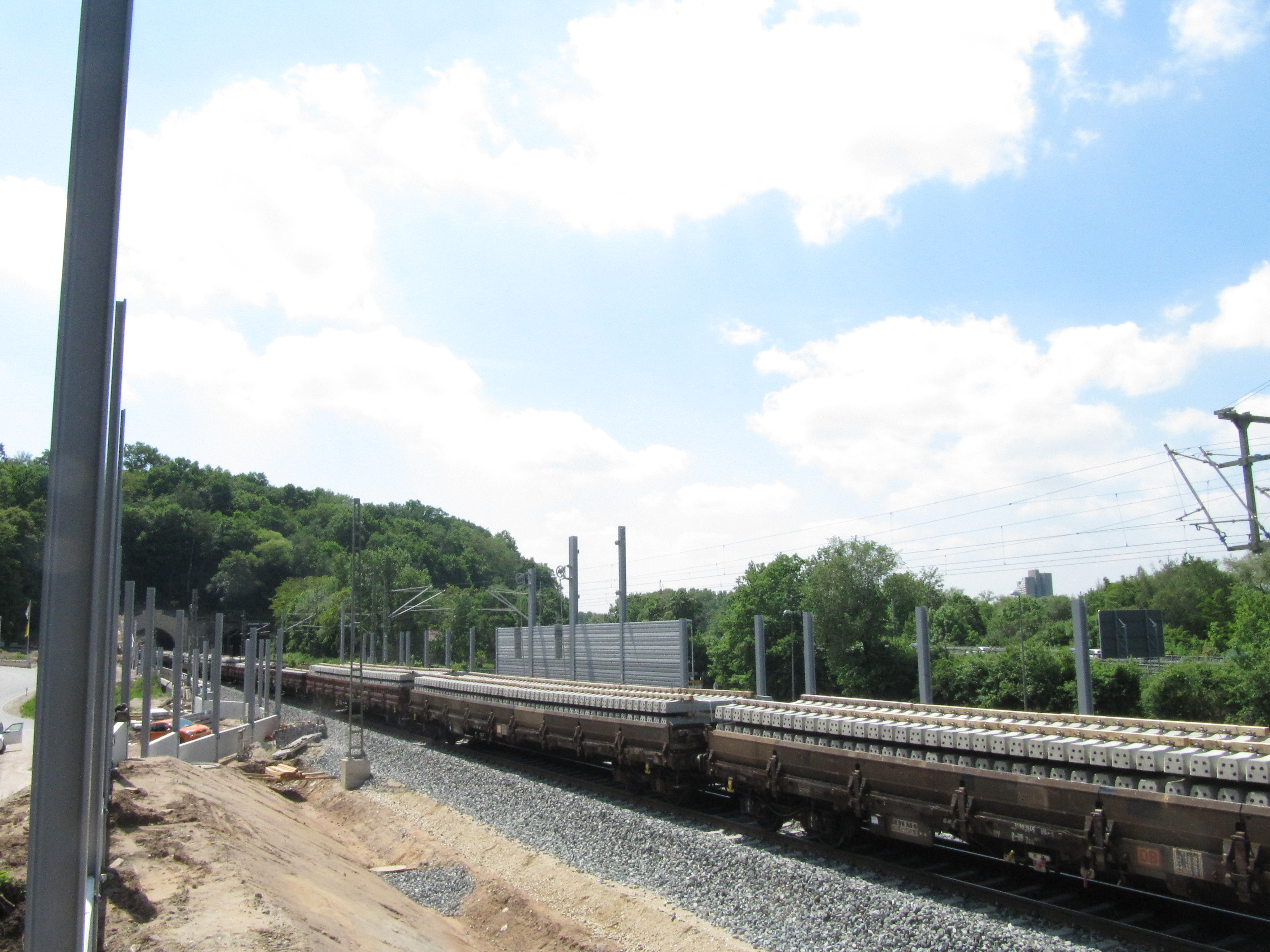 "Vierstraßenblick" 2016 nach der Lithographie von Nicholls und Allanson (1845). Von links nach rechts: der neue Eisenbahntunnel (unverwitterter Sandstein), der Burbergtunnel (verwitterter Sandstein, sehr dunkel), nicht sichtbar die Landstraße, die A73 (Frankenschnellweg) auf der Trasse des ehemaligen Ludwigskanals, nicht sichtbar die Regnitz.